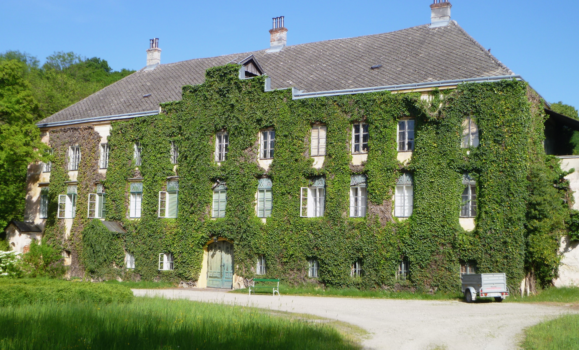 Schloss Sitzental